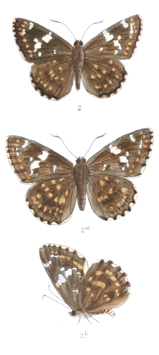 Celaenorrhinus ambareesa (male and females)